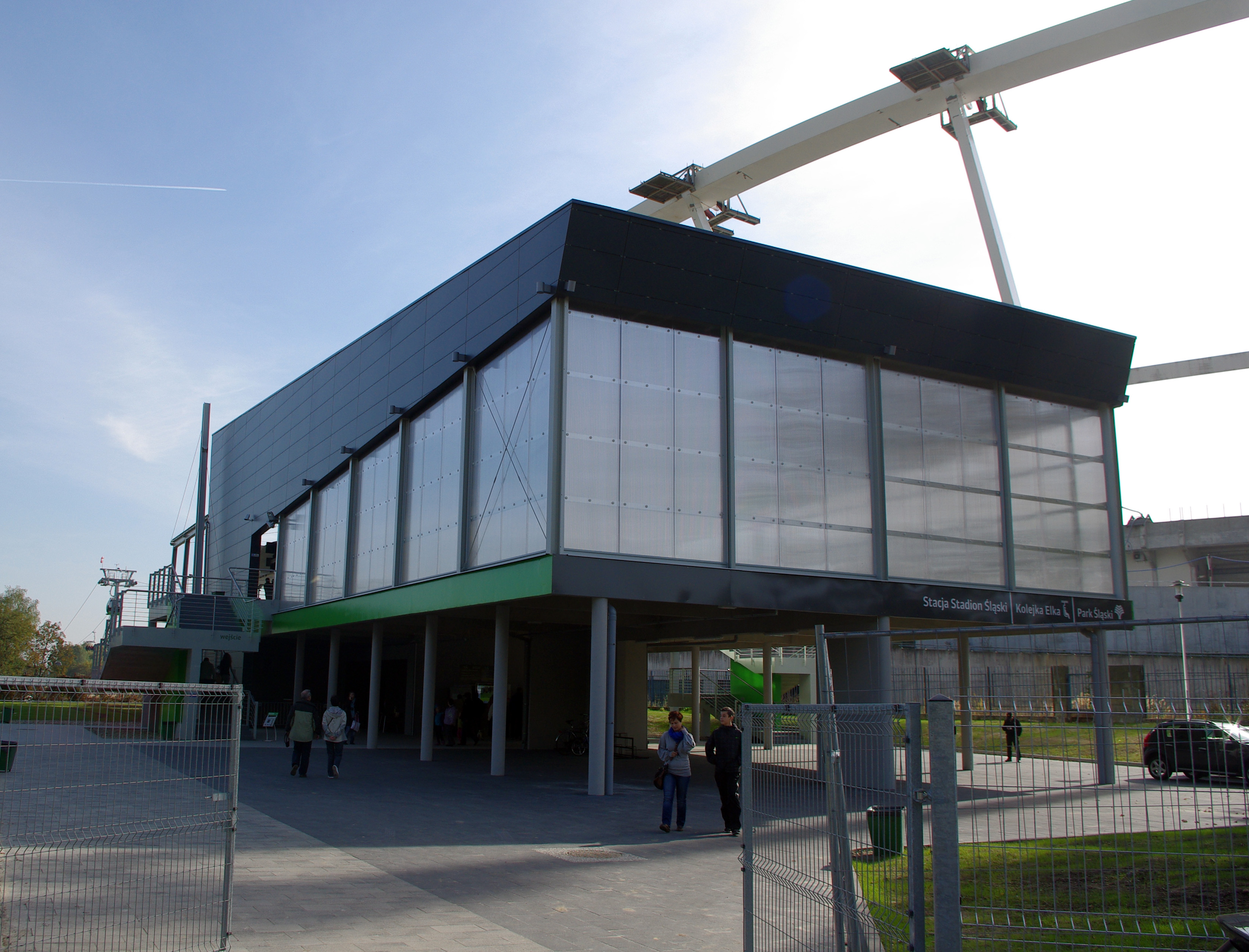 Stacja kolejki linowej Elka - Stadion Śląski